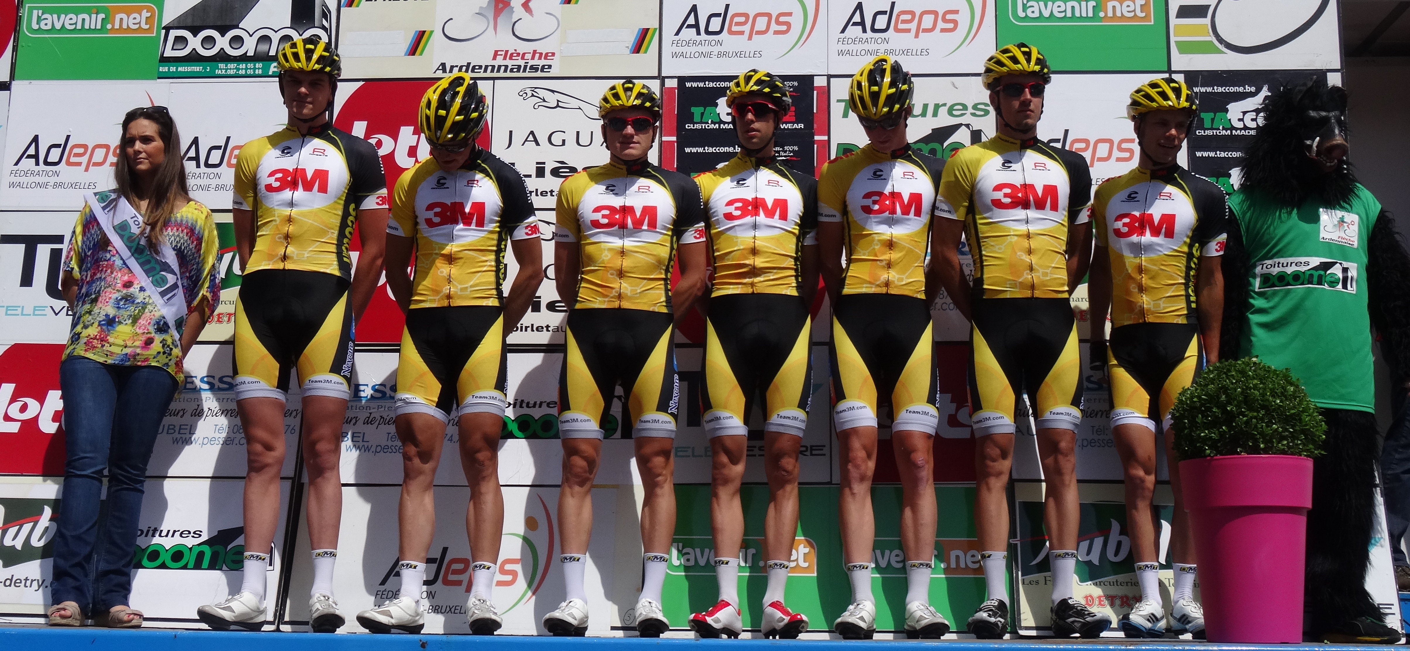 Reportage photographique réalisé le dimanche 22 juin à l'occasion du départ et de l'arrivée de la Flèche ardennaise 2014 à Herve, Belgique.